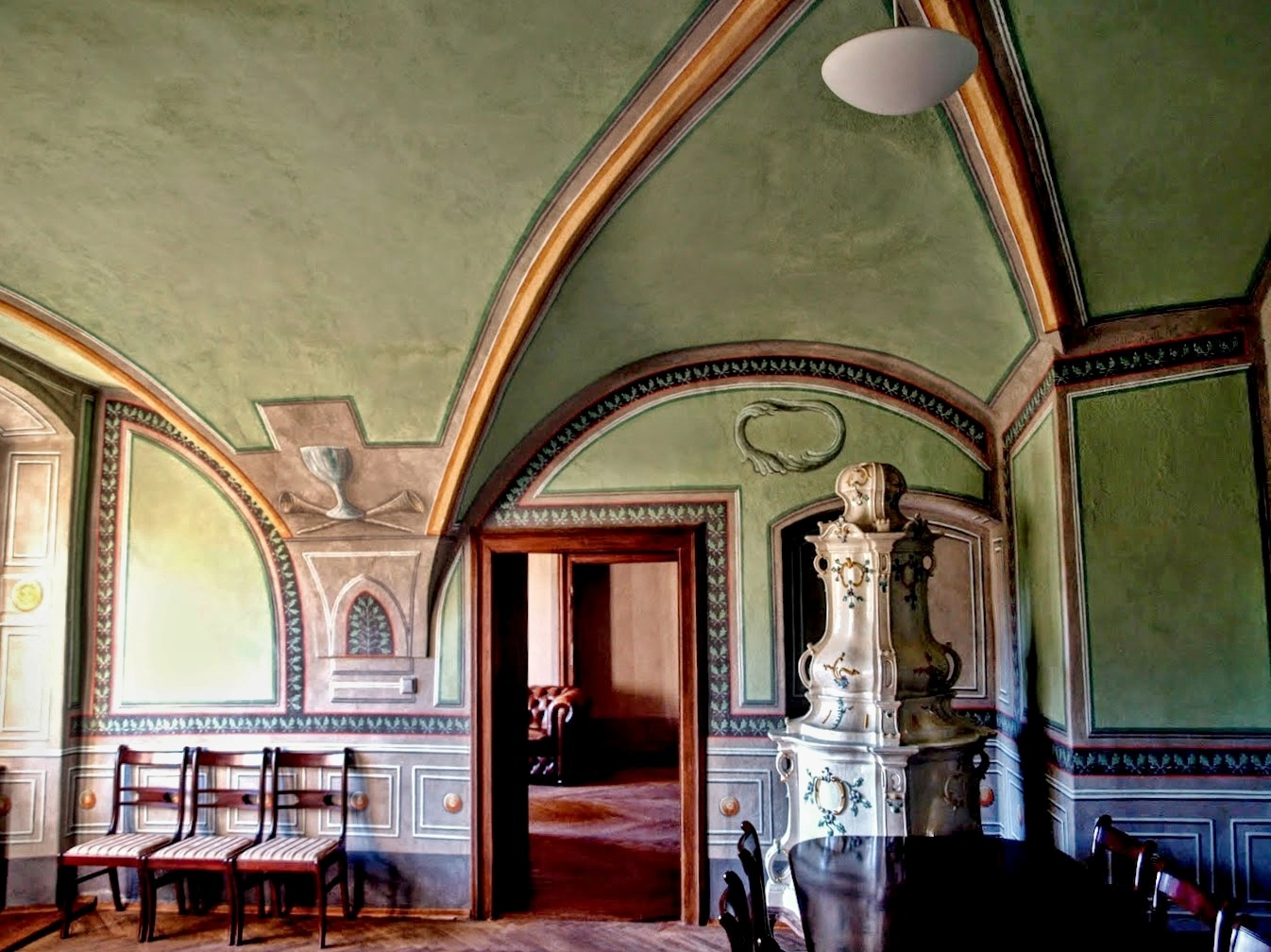 Někdejší jezuitská kolej, dnes Hotel Růže v Horní ulici 154, Český Krumlov